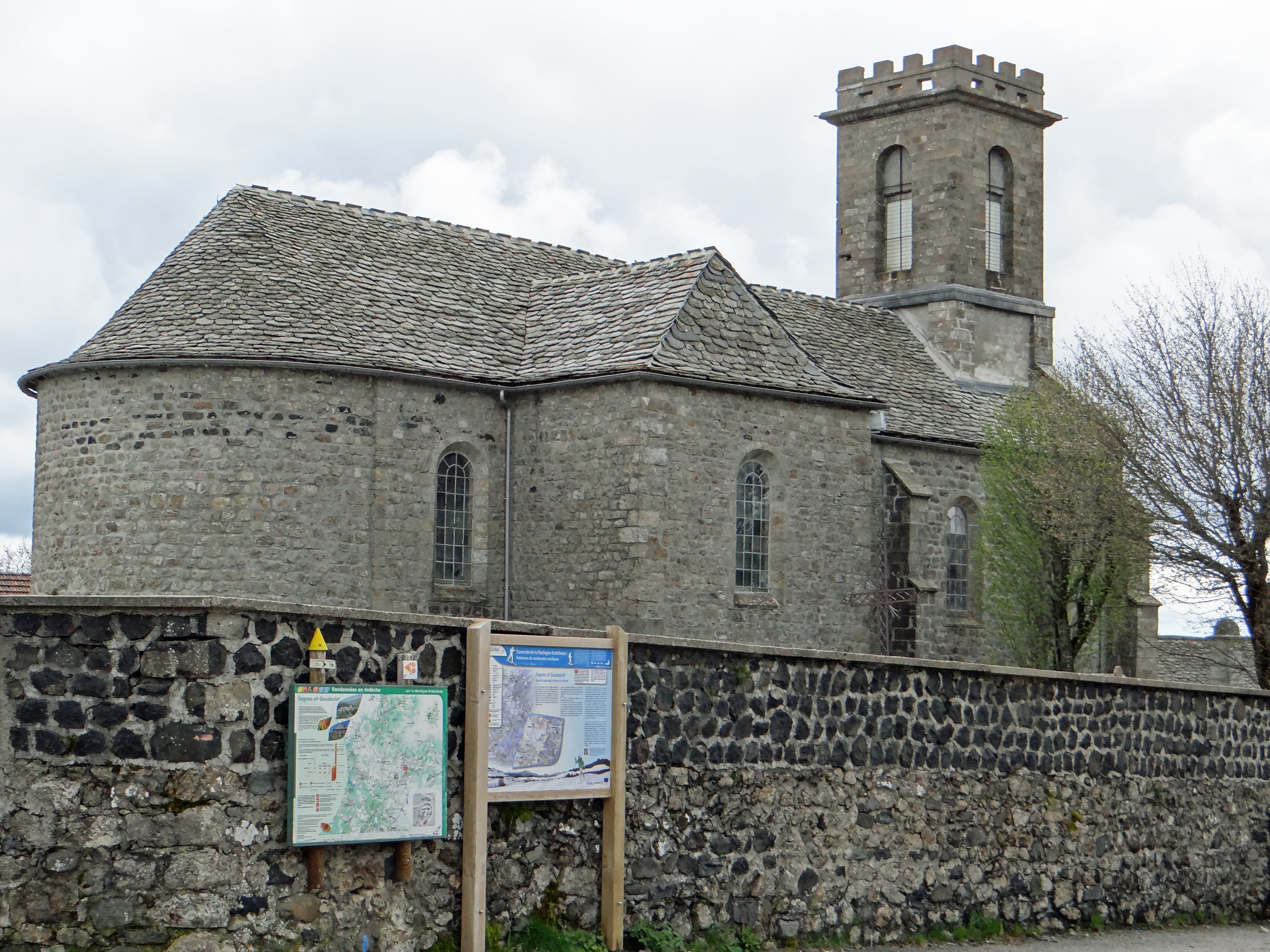 Sagnes-et-Goudoulet - Église Saint-Robert et Sainte-Marguerite - Ensemble